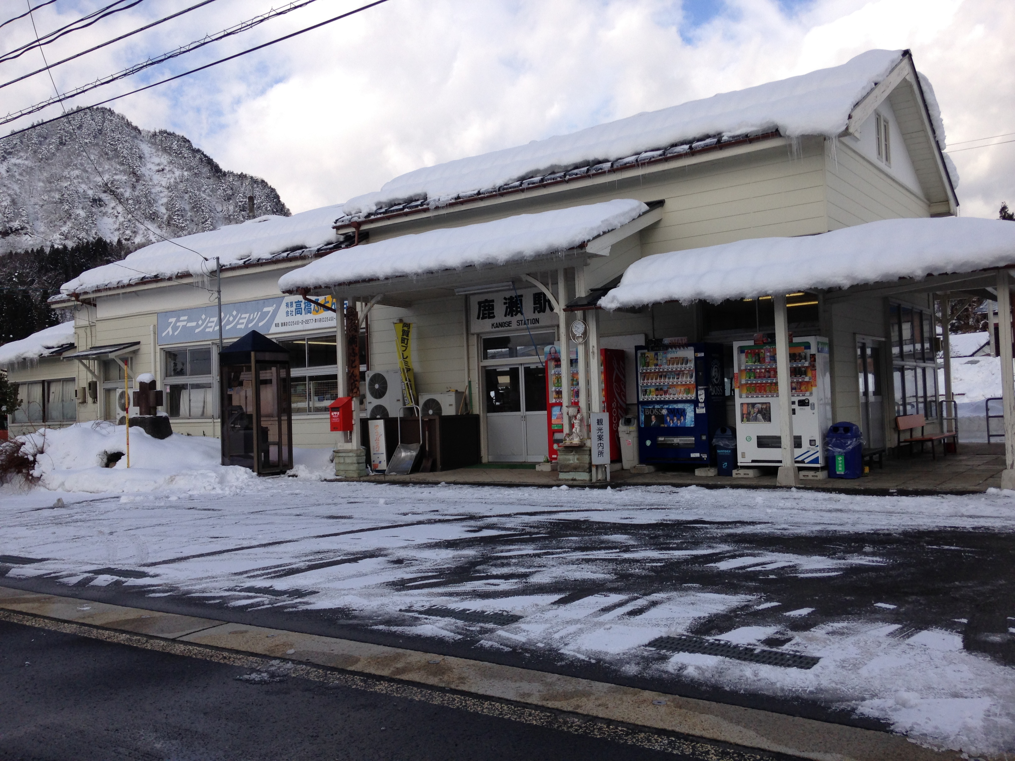 鹿瀬駅（2014年1月14日）